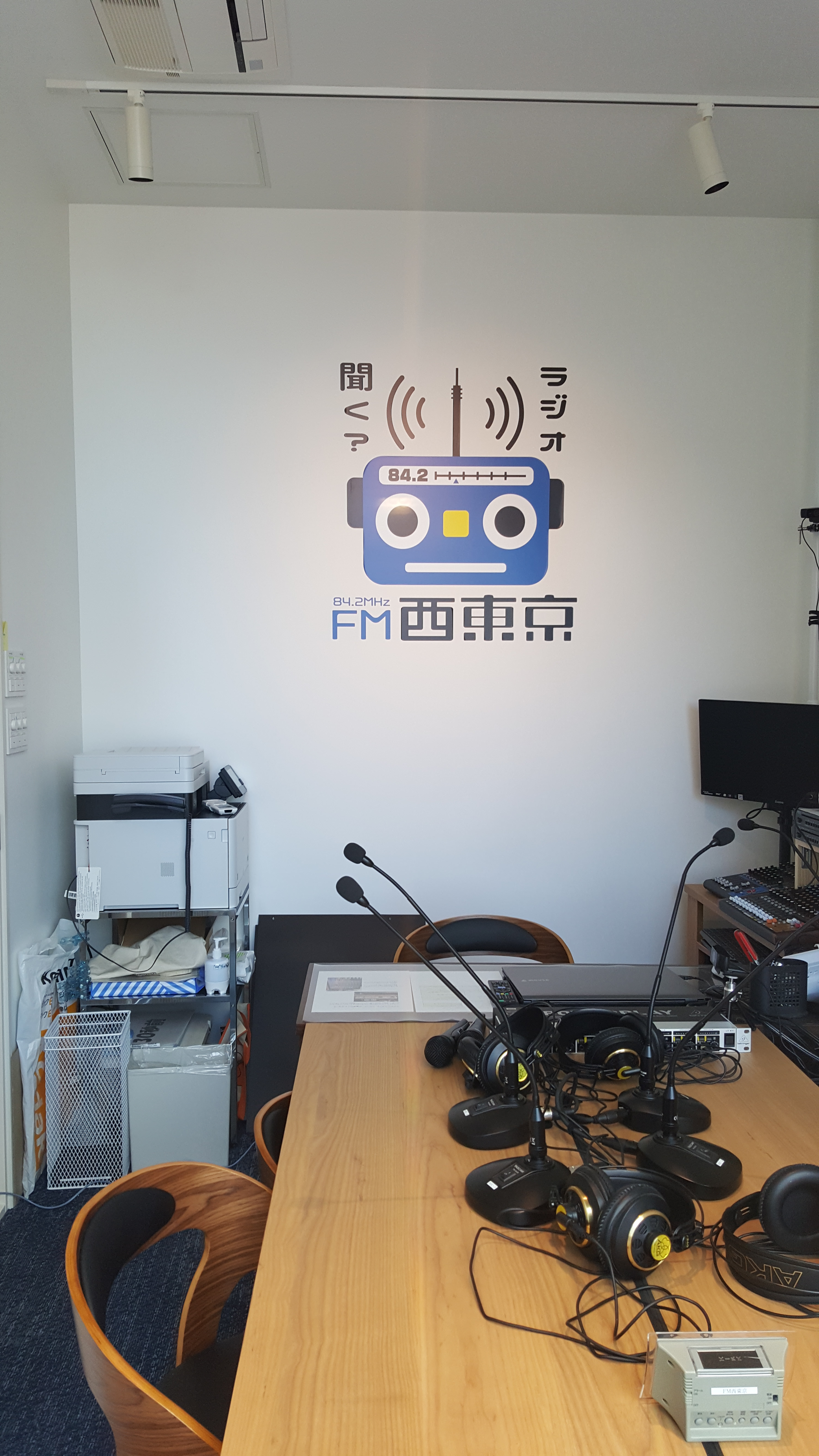 田無駅・まちステ西東京・エフエム西東京サテライトスタジオ